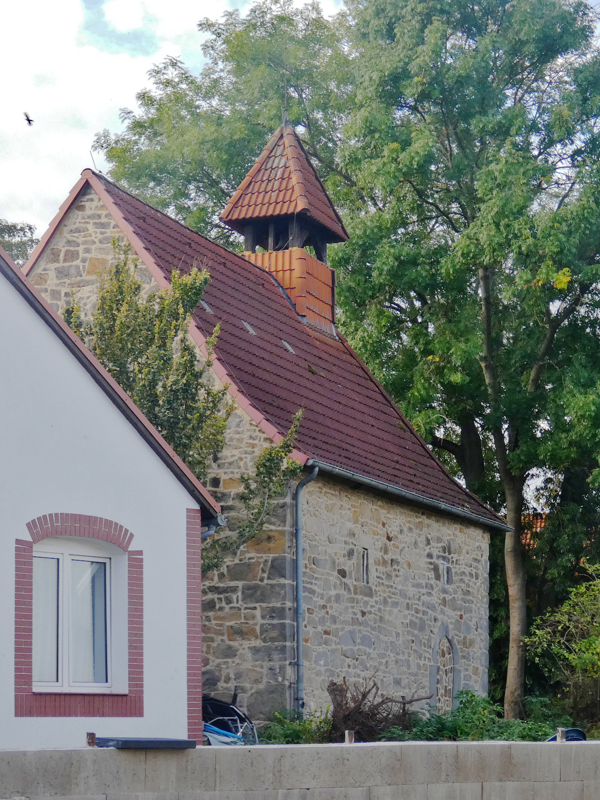 Die Nordseite der Kapelle Linderte. Aufgenommen über angrenzende Privatgrundstücke hinweg. Zwei winzige Fenster und der 1915 vermauerten Eingang.